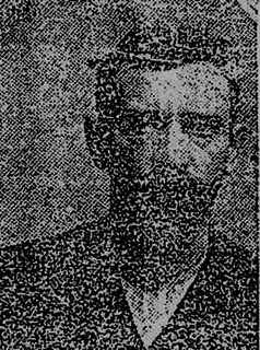 Fotografía de Francisco Guerrero "El Chalequero", el primer asesino serial en México.